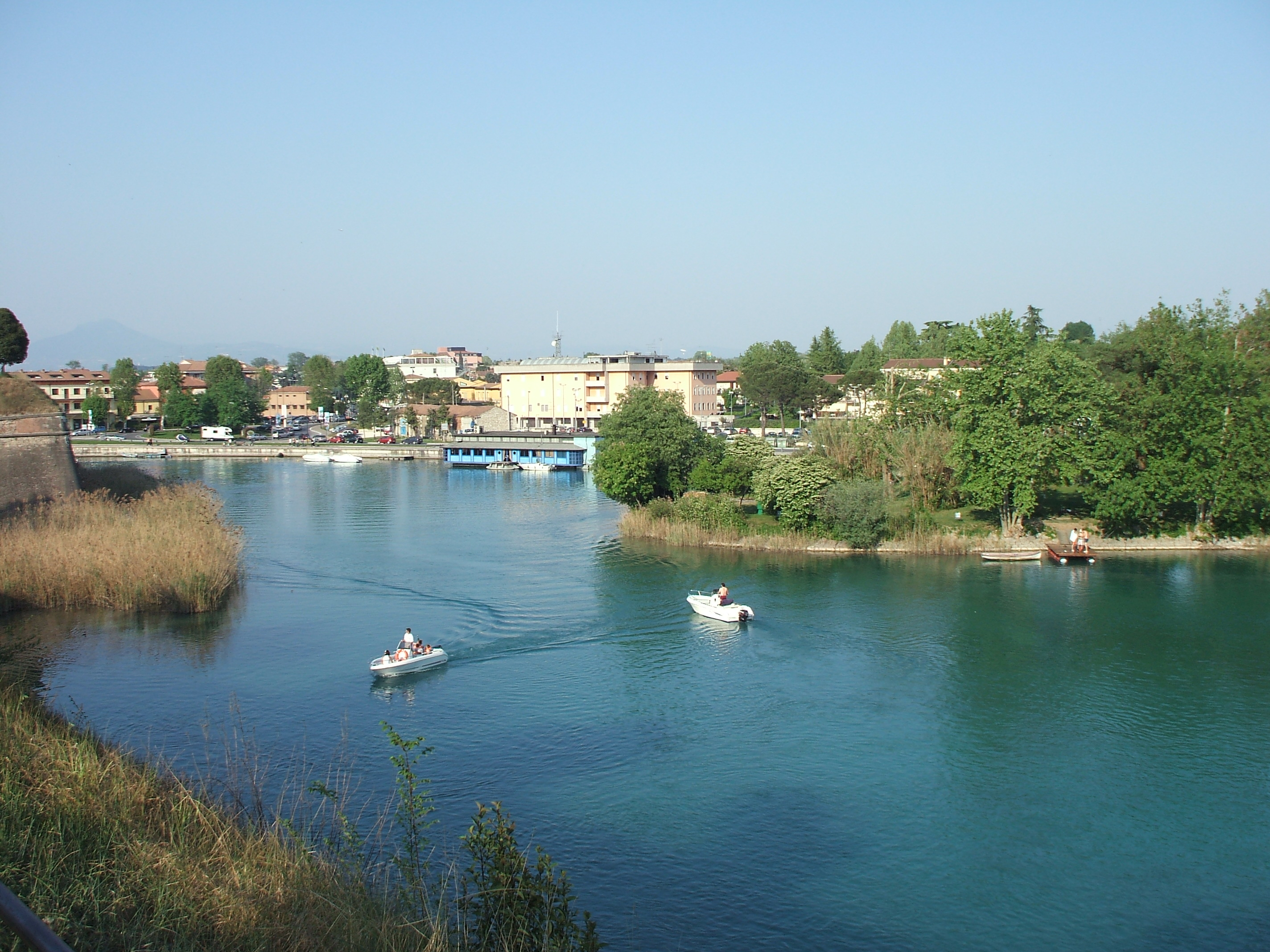 Mincio river, as seen from Peschiera del Garda.